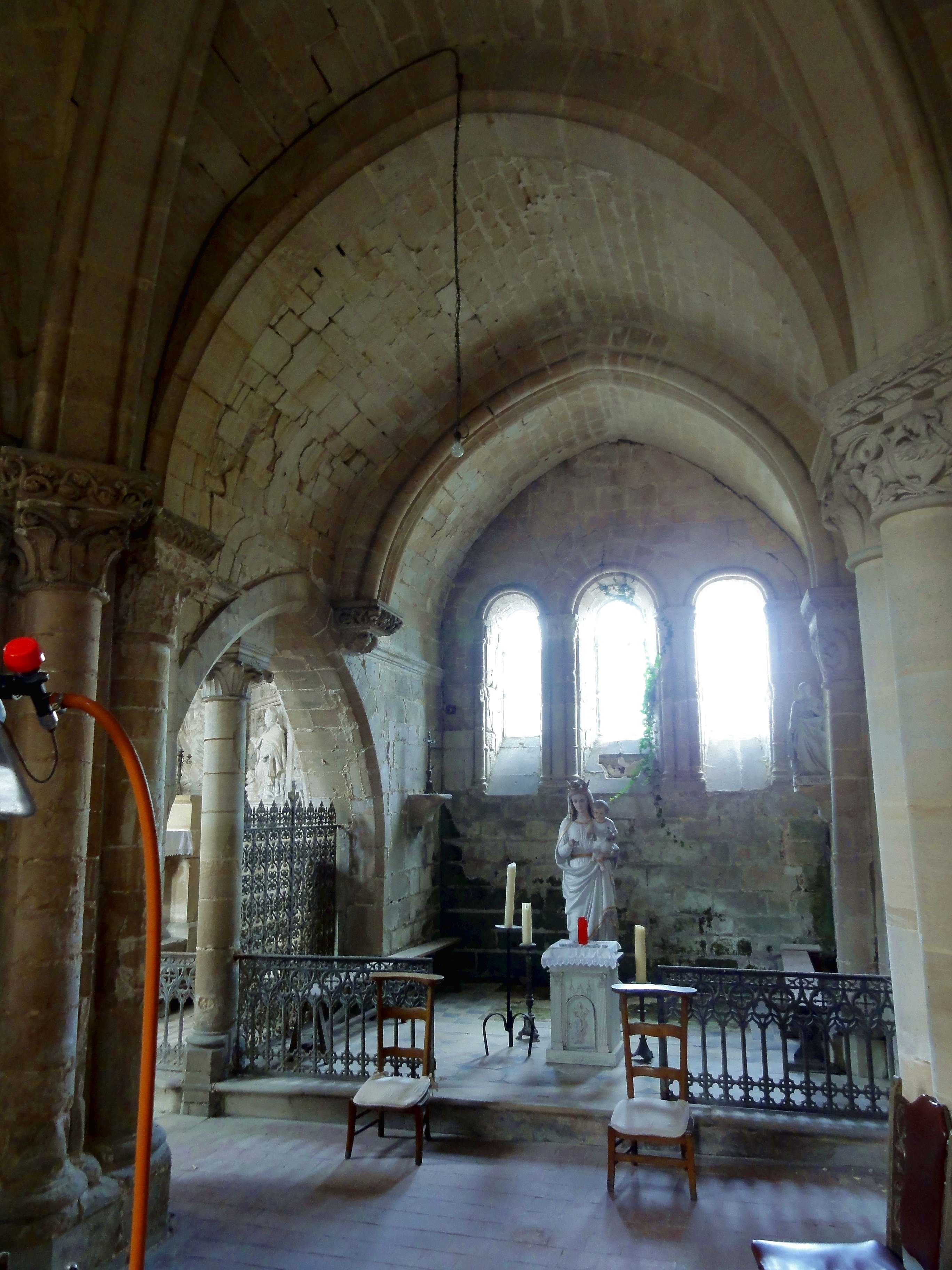 Intérieur de l'église (voir titre).